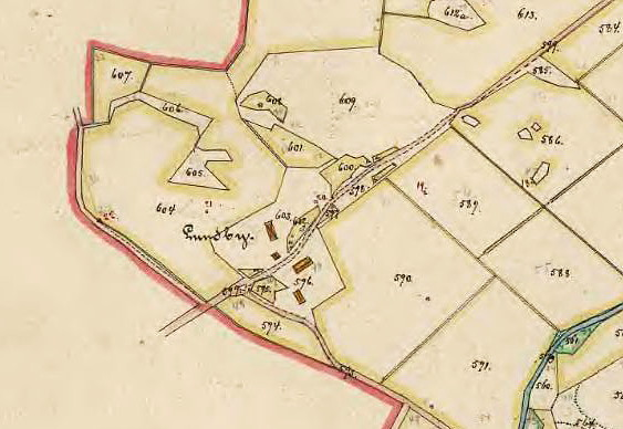 Del av karta över Bergaholm och Lundby, Salems socken